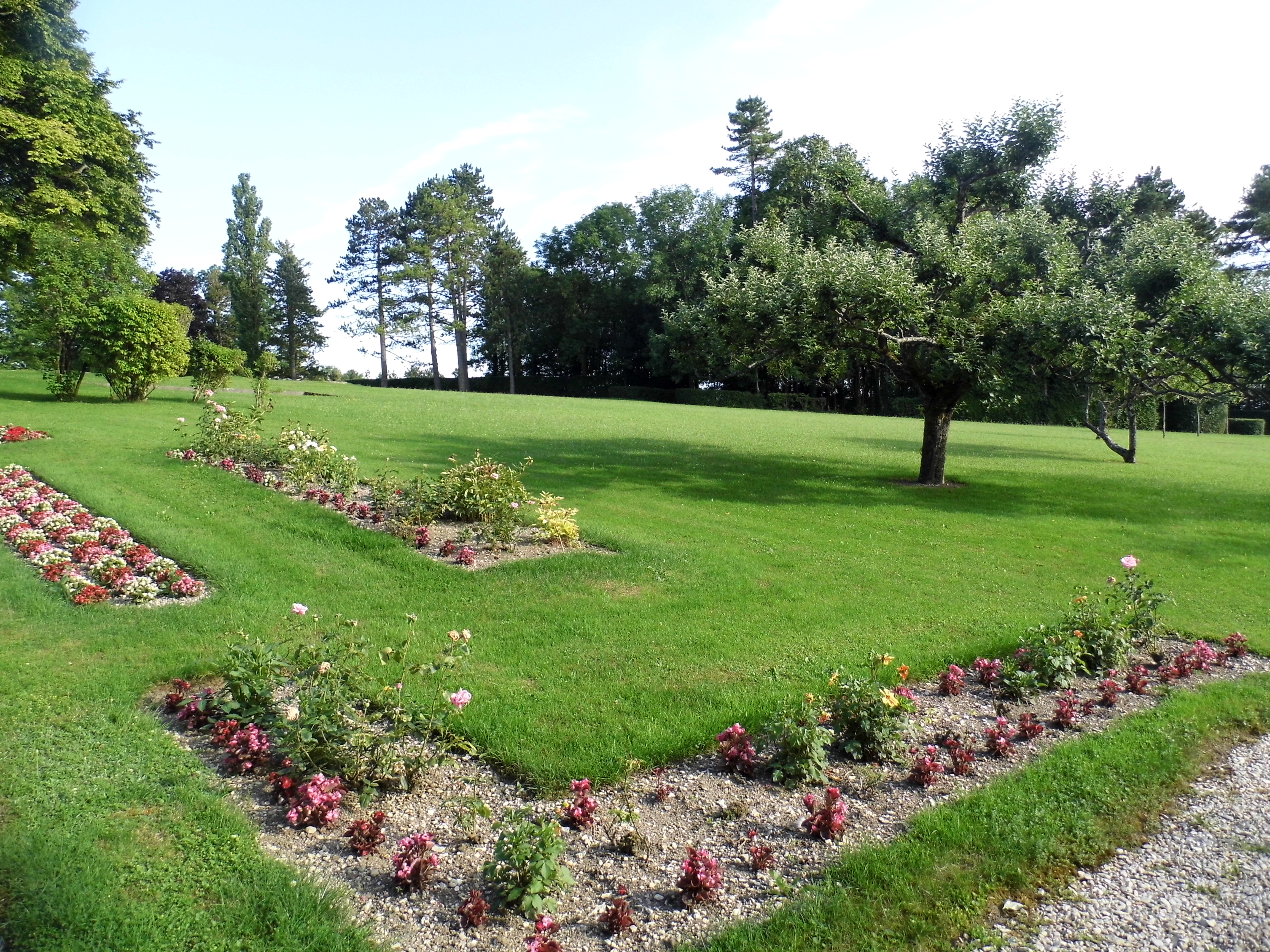 Parc de La Boisserie, à Colombey-les-Deux-Églises